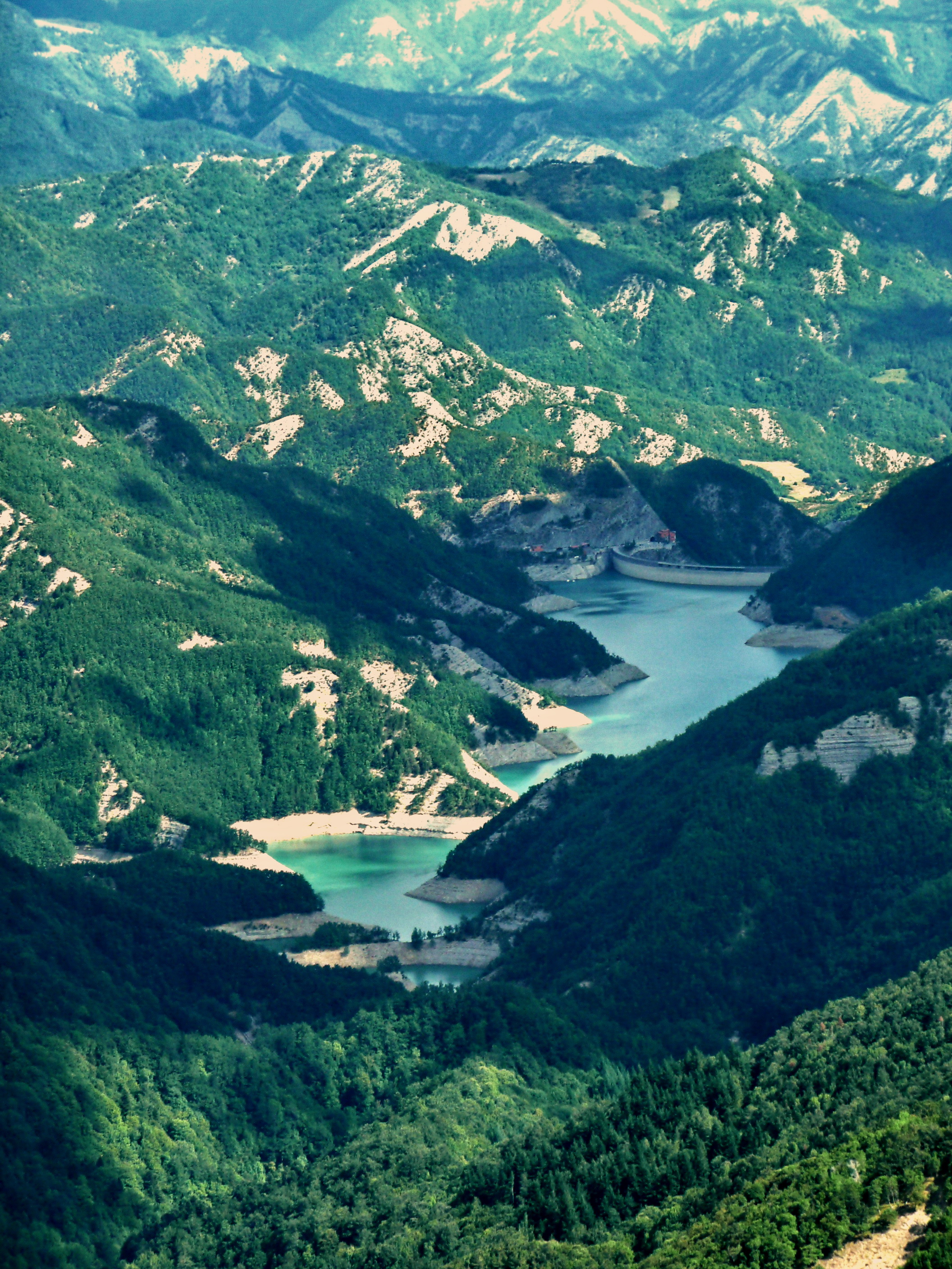 Diga di Ridracoli - lago This is a photo of a monument which is part of cultural heritage of Italy.